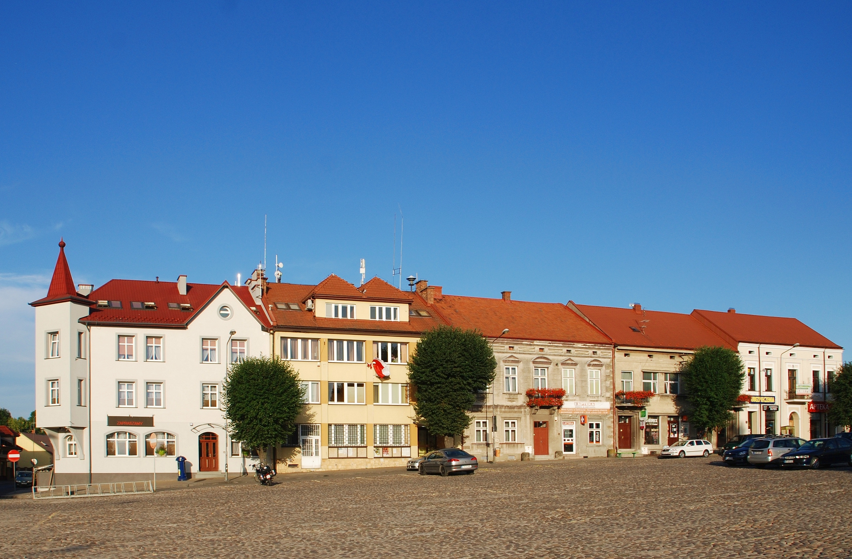 miasto Zakliczyn